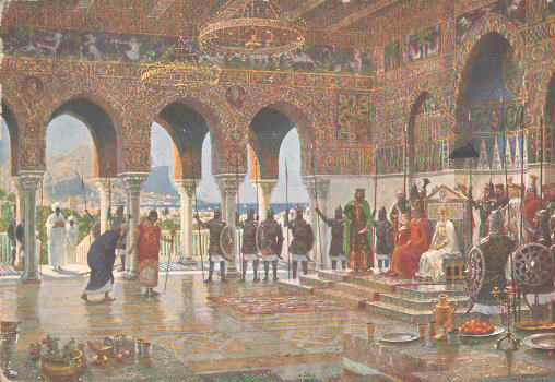 Hofhaltung Kaiser Friedrich II. im Lustschlosse Favára bei Palermo, Schullehrbild von C. C. Meinhold nach einem Gemälde von Michael Zeno Diemer